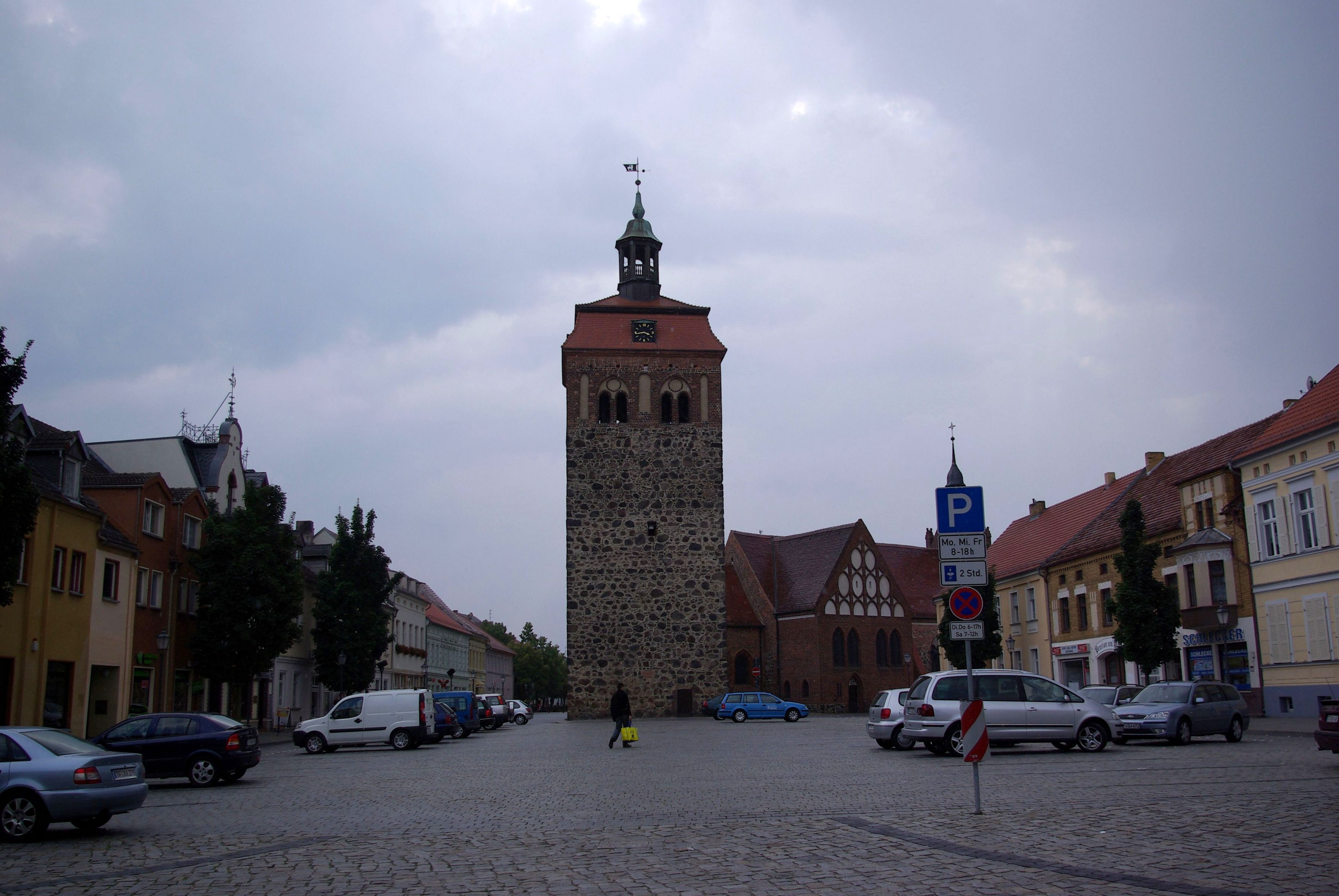 Luckenwalde in Brandenburg. Der Markturm steht unter Denkmalschutz. Rechts vom Marktturm befindet sich die Stadtkirche St. Johannis.